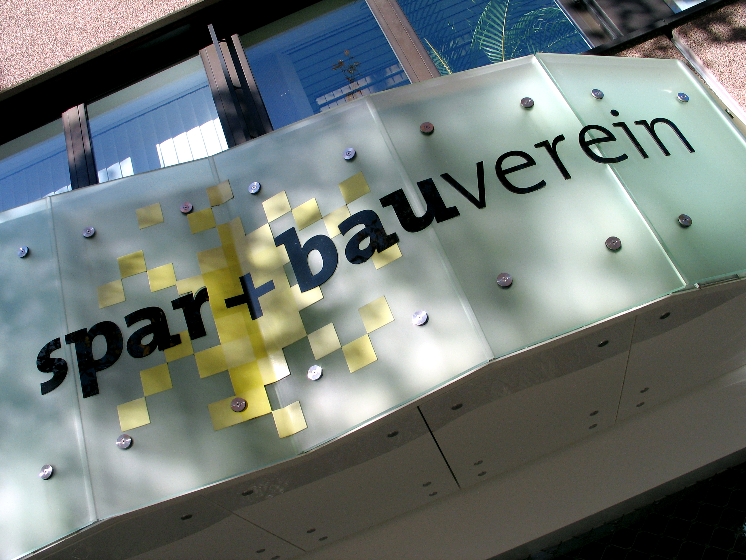 Schriftzug und neues Logo der Spar- und Bauverein e.G (spar + bauverein) über dem Eingang zum Haupthaus der Genossenschaft ...